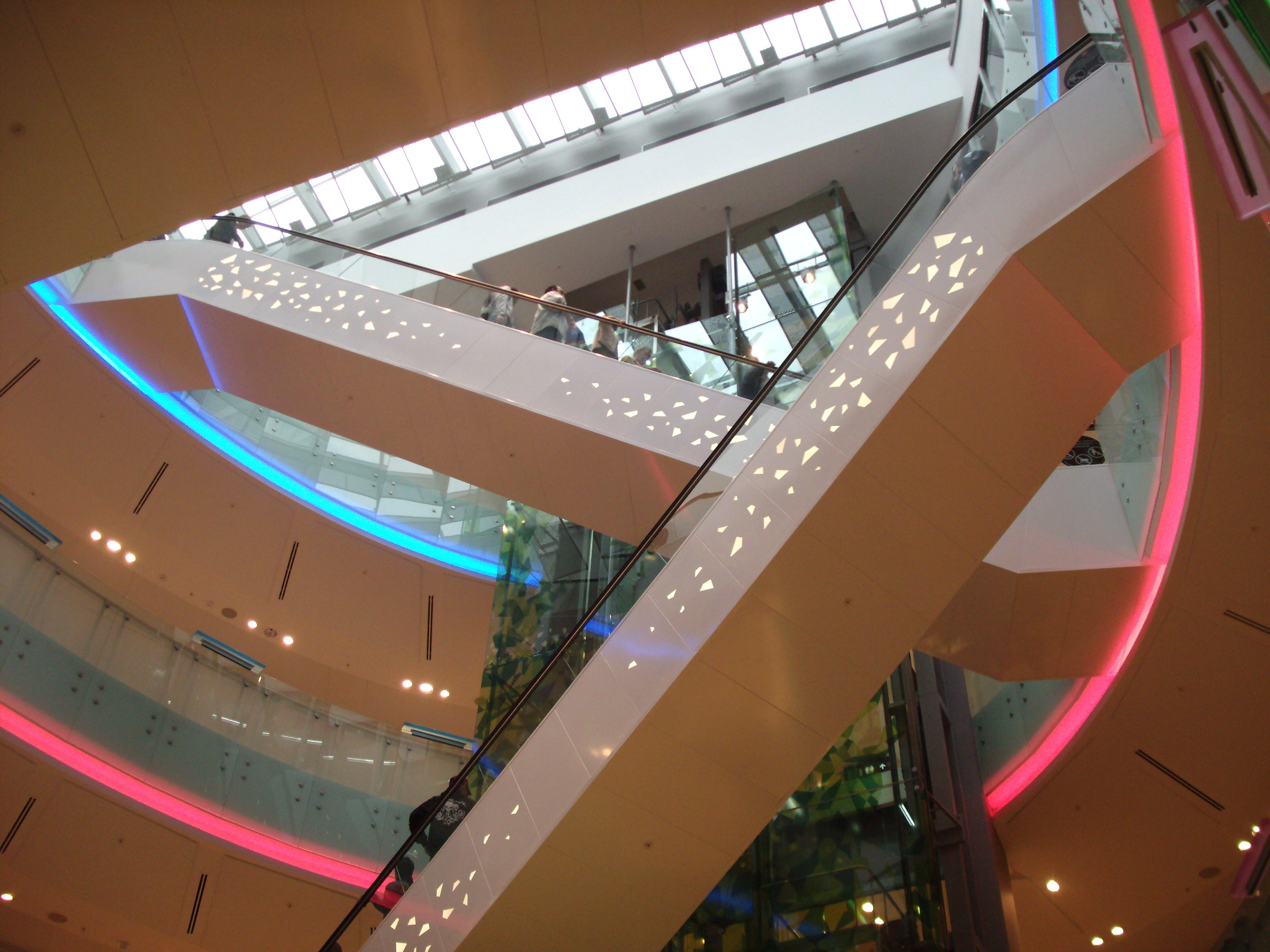 La tour Oxygène est dans le centre commercial de la Part-Dieu, à Lyon.